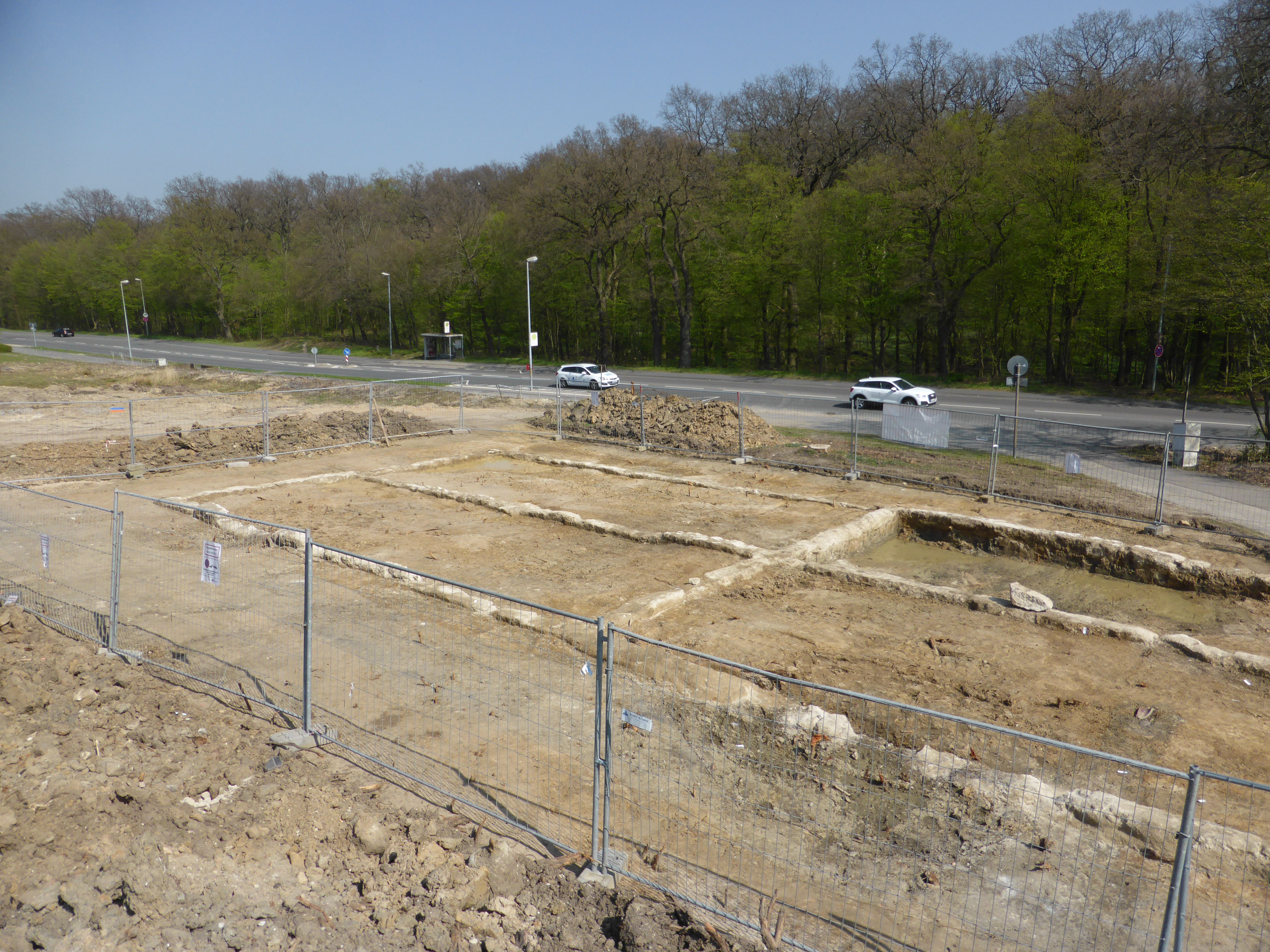 Barackenfundamente an der Breslauer Straße aus den 1940er Jahren, freigelegt 2017.